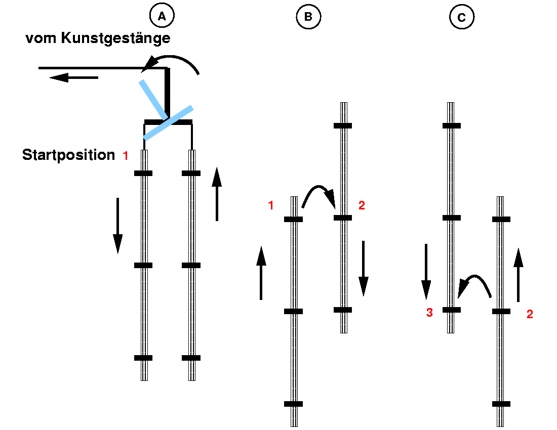 Schematische Darstellung der Fahrkunst